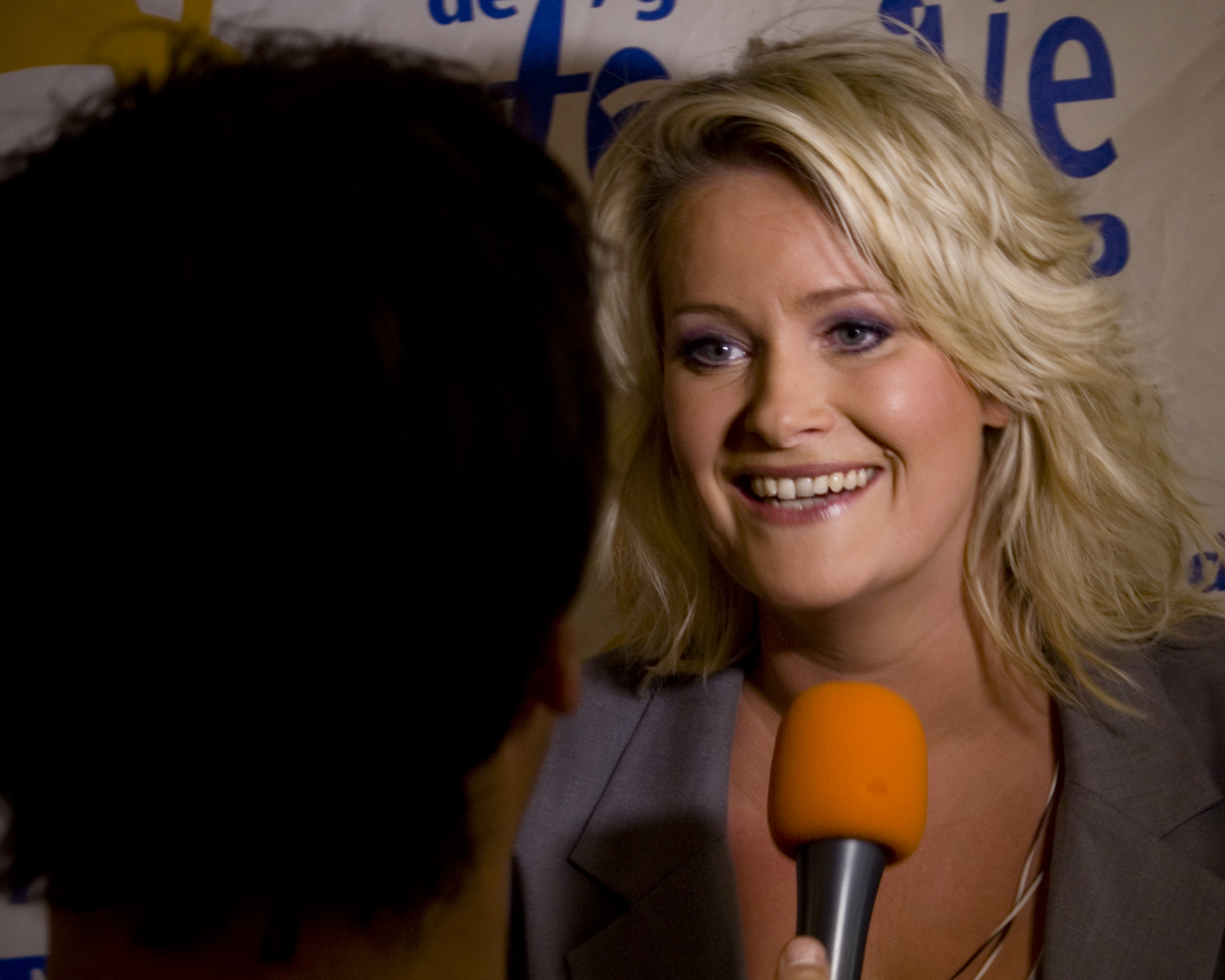 Erikah Karst tijdens een Interview bij het Tros Muziekfeest op het Plein in Ede.